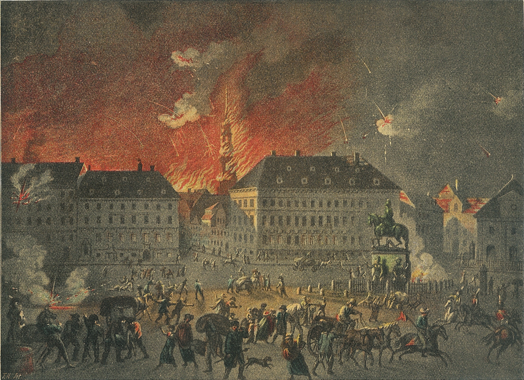 Københavns bombardement natten mellem 4. og 5. september 1807. Set fra Kongens Nytorv. Maleri af Christian August Lorentzen (1749–1828) Alternative names C.A. Lorentzen; LorensenDescriptionDanish painter and university teacherDate of birth/death 10 August 1749 8 May 1828Location of birth/death Sønderborg CopenhagenAuthority control : Q3416034 VIAF: 60181263 ISNI: 0000 0001 1653 4072 ULAN: 500023667 GND: 130141399 KulturNav: 4bdf27c4-8da5-4c85-b69a-92daaf0c7a34 creator QS:P170,Q3416034 .